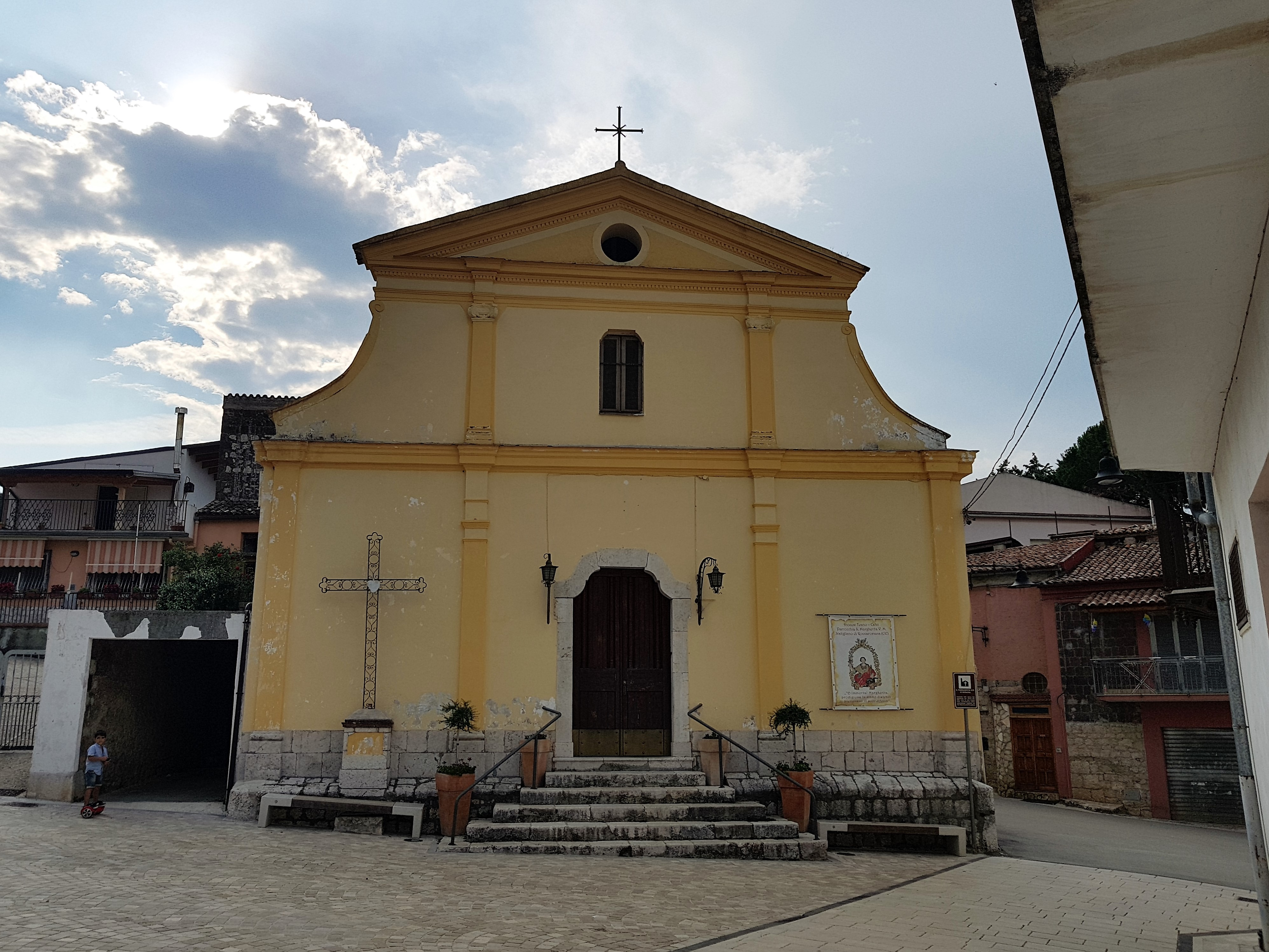 Facciata esterna della chiesa di Santa Margherita di Roccaromana